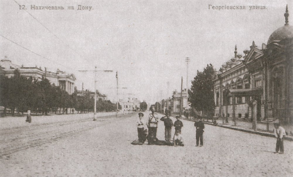 Нахичевань-на-Дону. Слева Нахичеванский городской театр, справа - особняк Ф.С.Кечекьяна, далее дом А.С.Сагирова. Прямо по центру дом А.Когбетлиева